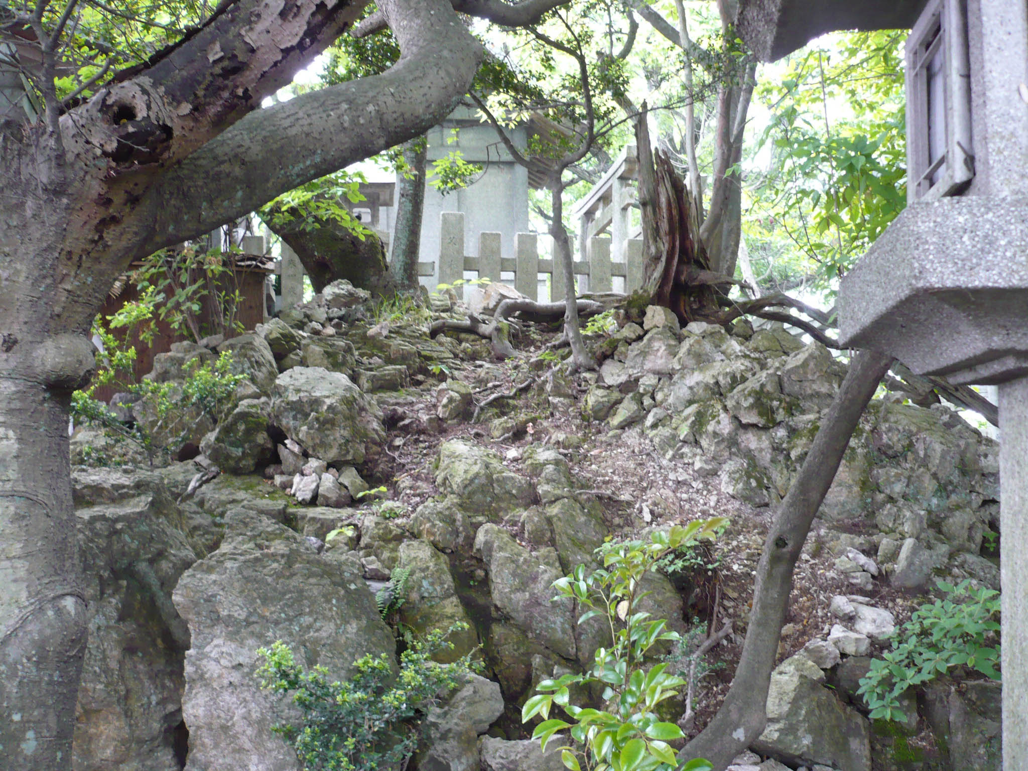 本丸跡